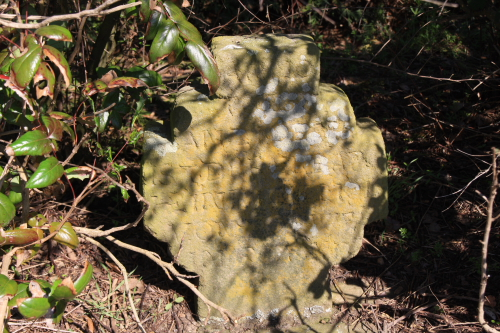 Memorienkreuz am Ortsausgang von Irresheim Richtung Frauwüllesheim im Gestrüpp